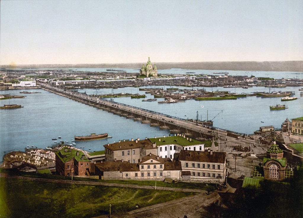 Вид на Стрелку Оки и Волги